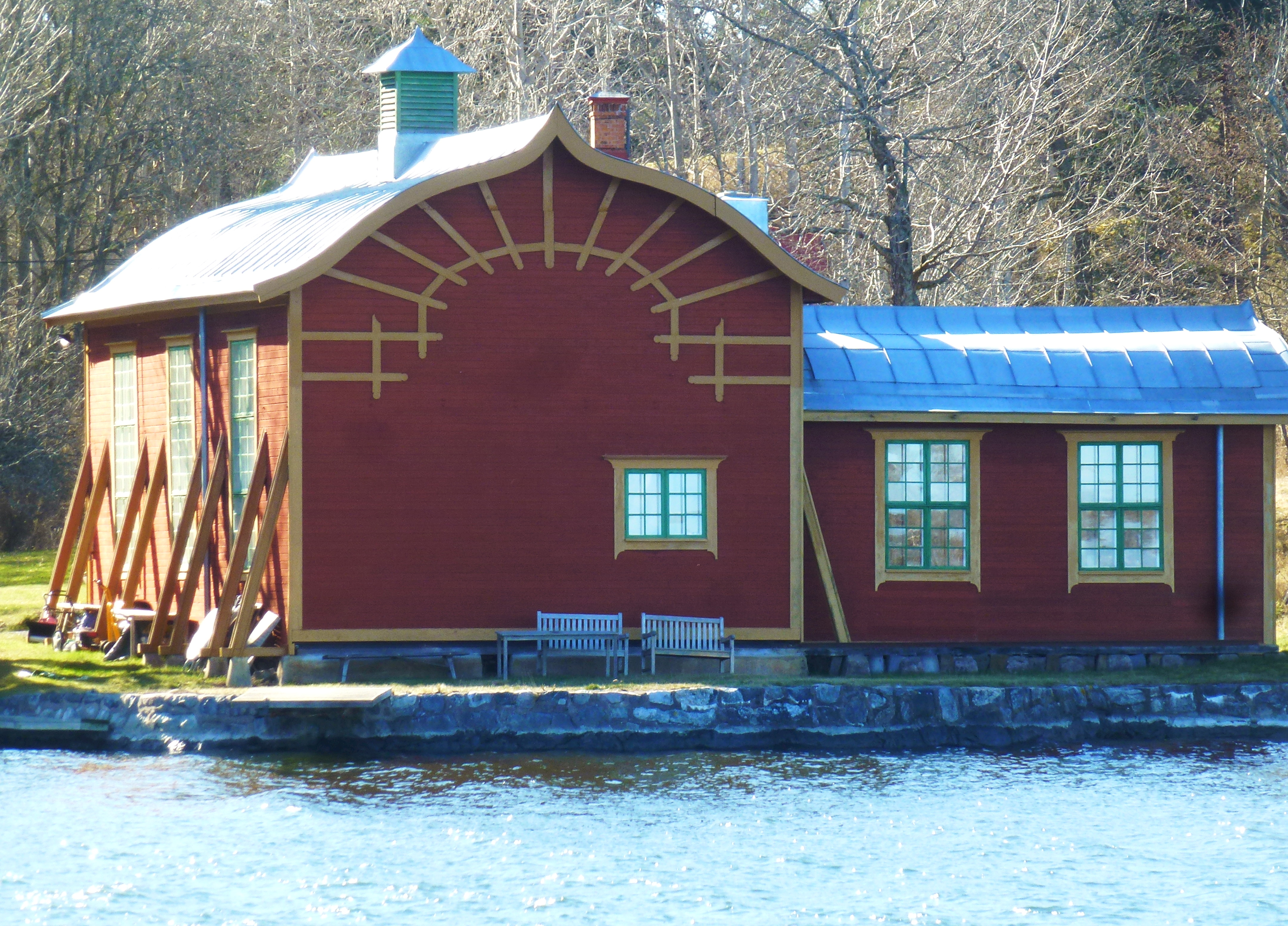 Täcka udden, Hangar